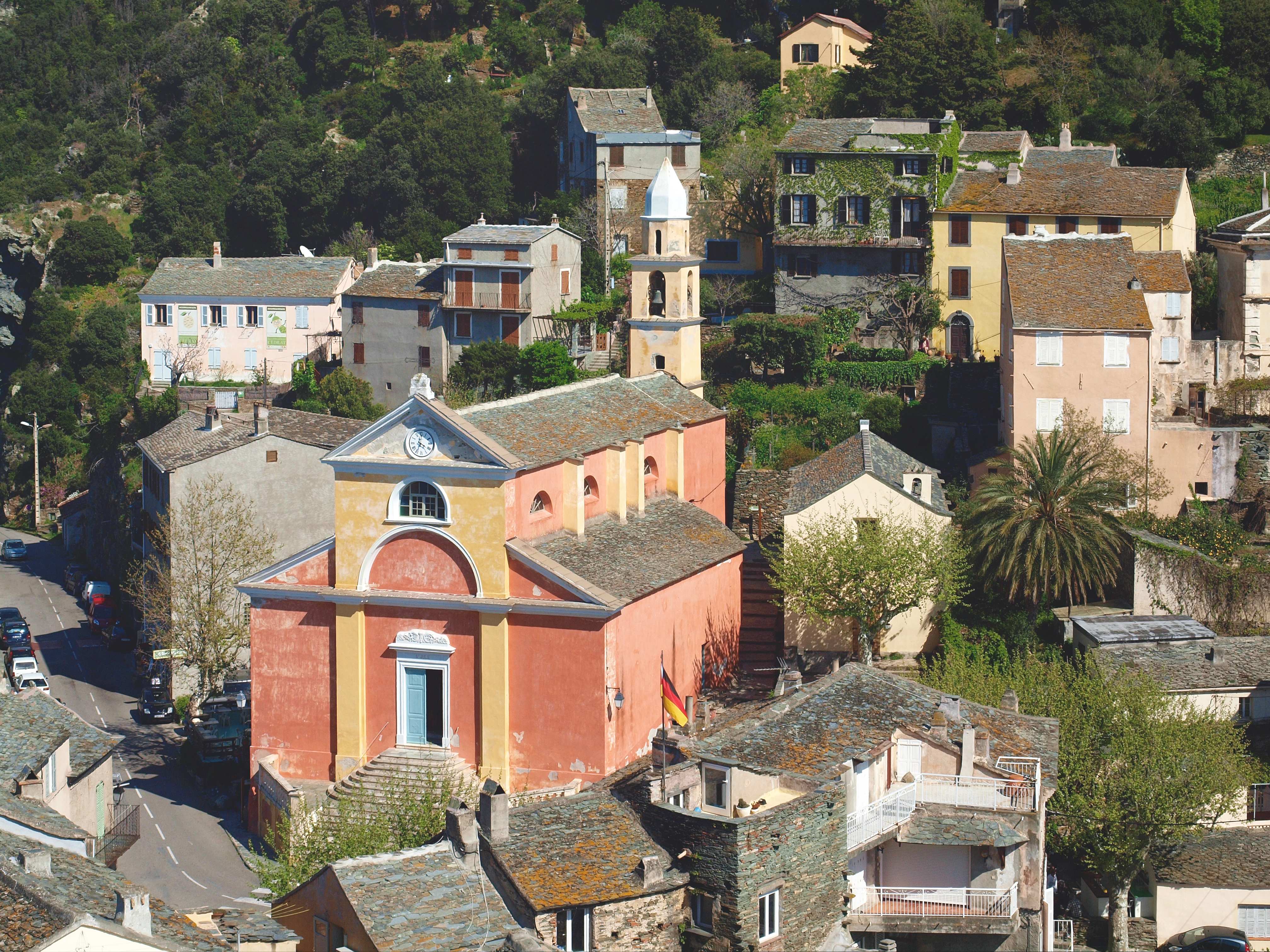 Nonza (Corsica) - Église Santa Giulia (14e s. - MH)